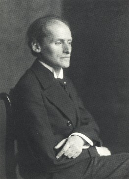 Porträt des Pianisten Carl Friedberg.